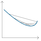 Convex function שורטט בעזרת Sodipodi על־ידי עבדכם הנאמן.